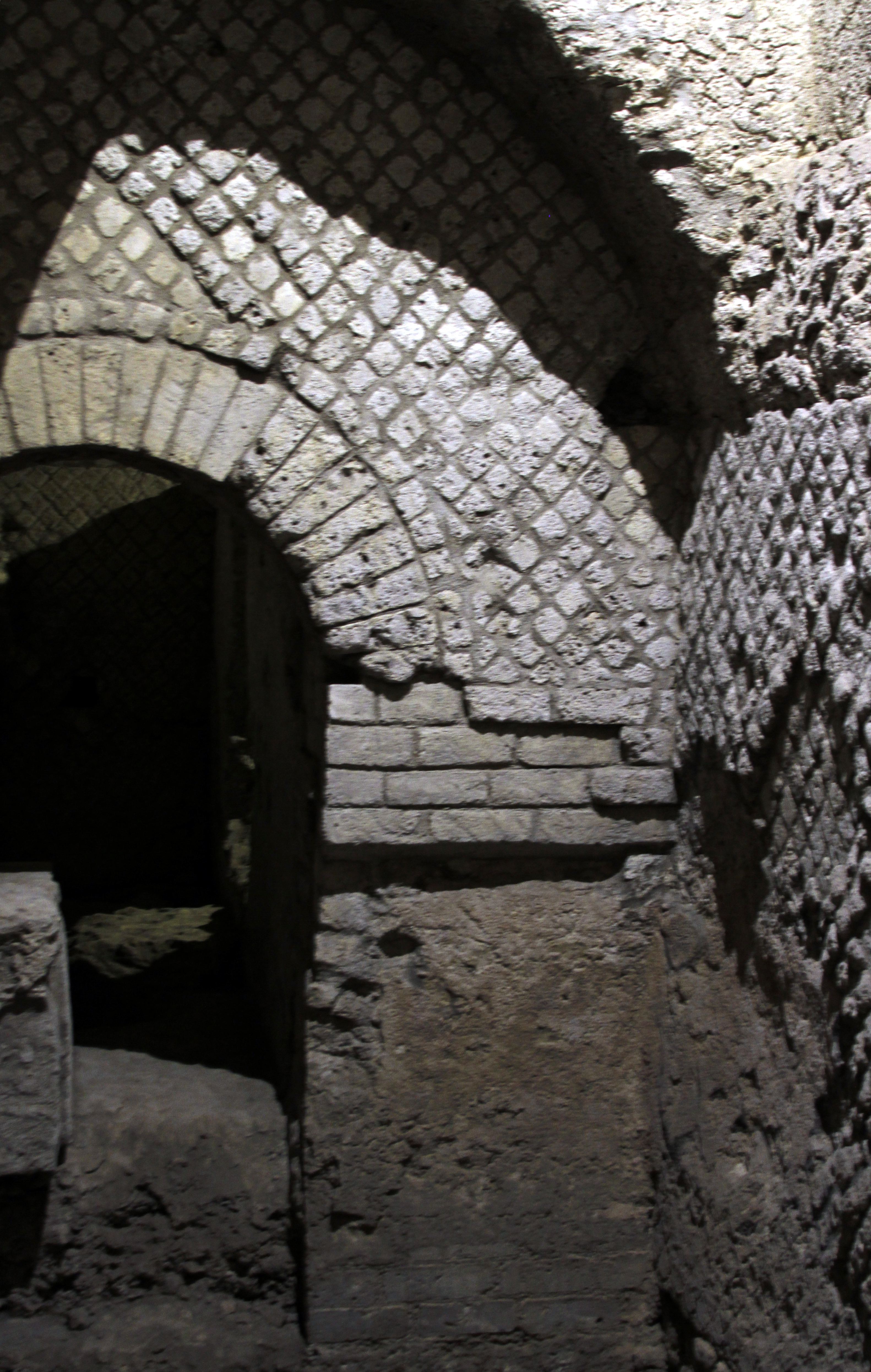 Ruínas sob San Lorenzo Maggiore, Nápoles